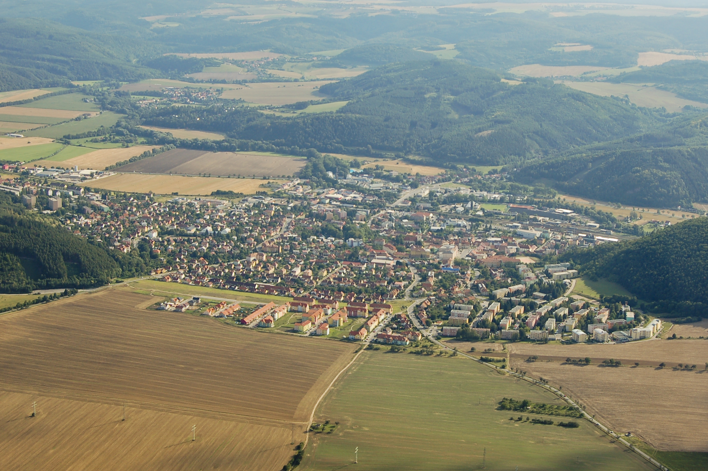 Letecký snímek Tišnova